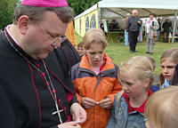 Bischof Dr. Franz-Josef Bode